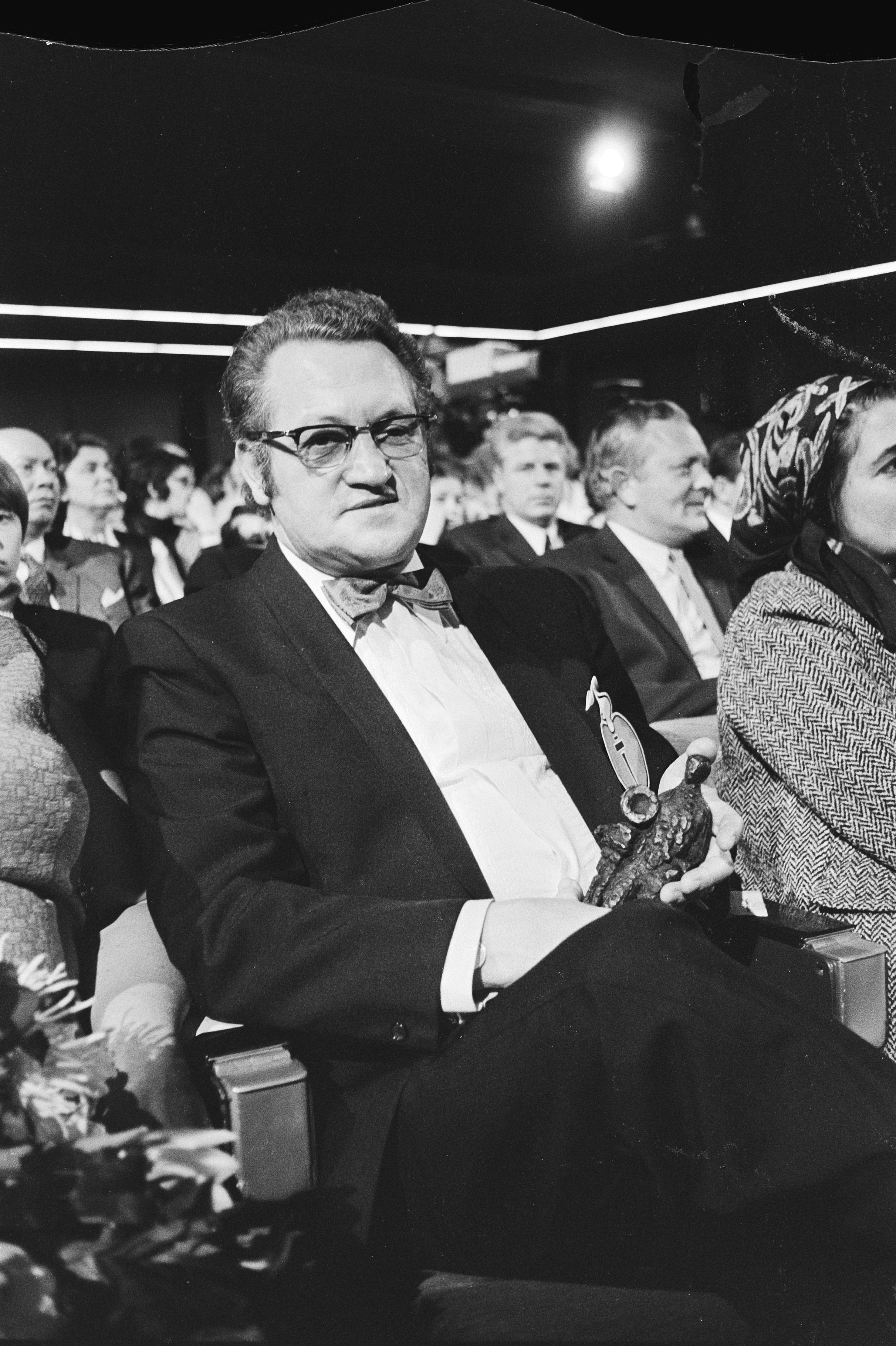 Collectie / Archief : Fotocollectie Anefo Reportage / Serie : [ onbekend ] Beschrijving : Willem Duys reikt Edisons uit in TV-programma "Voor de vuist weg", Johnny Jordaan met Edison Datum : 26 februari 1971 Trefwoorden : prijsuitreikingen, zangers Persoonsnaam : Jordaan, Johnny Instellingsnaam : Edison Fotograaf : Verhoeff, Bert / Anefo Auteursrechthebbende : Nationaal Archief Materiaalsoort : Negatief (zwart/wit) Nummer archiefinventaris : bekijk toegang 2.24.01.05 Bestanddeelnummer : 924-3065